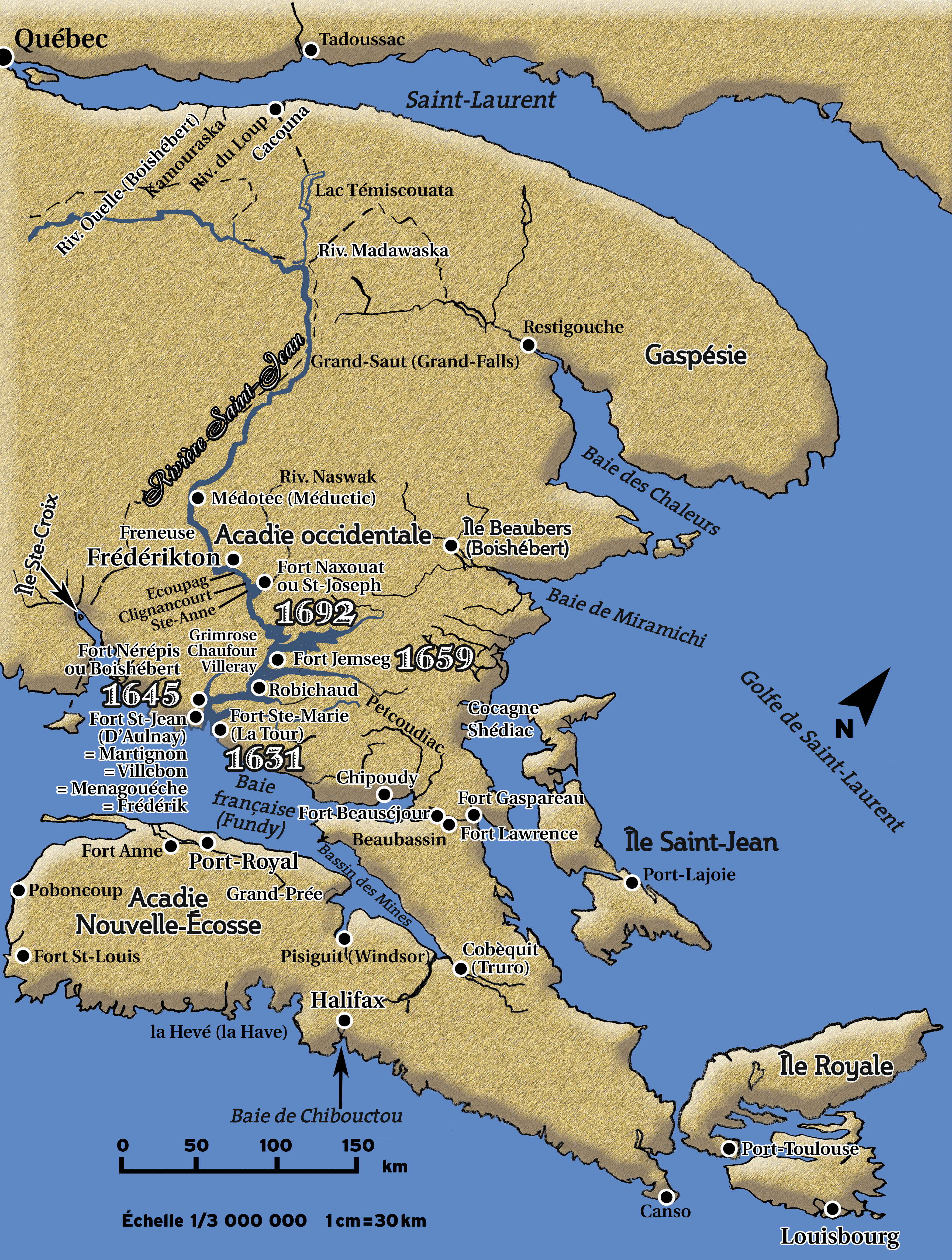 Certaines dates historiques concernant le peuple acadien